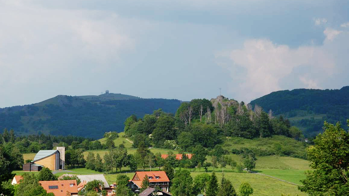 Rhoen, Wachtküppel vor der Wasserkuppe